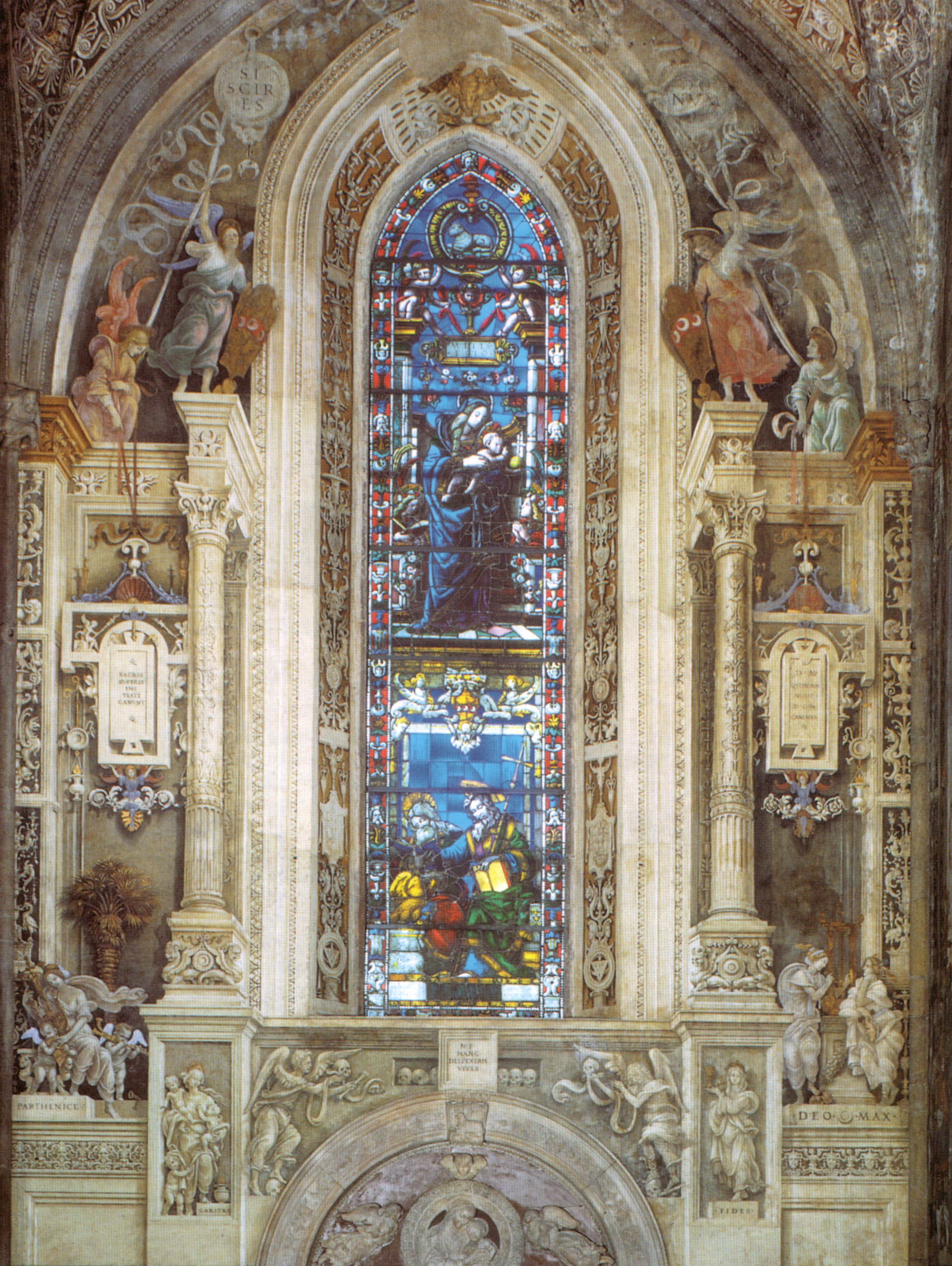 it= La parete di fondo della cappella di Filippo Strozzi con la vetrata della monofora disegnata da Filippino Lippi con in alto una Madonna con Bambino e in basso i santi Giovanni Evangelista e Filippo